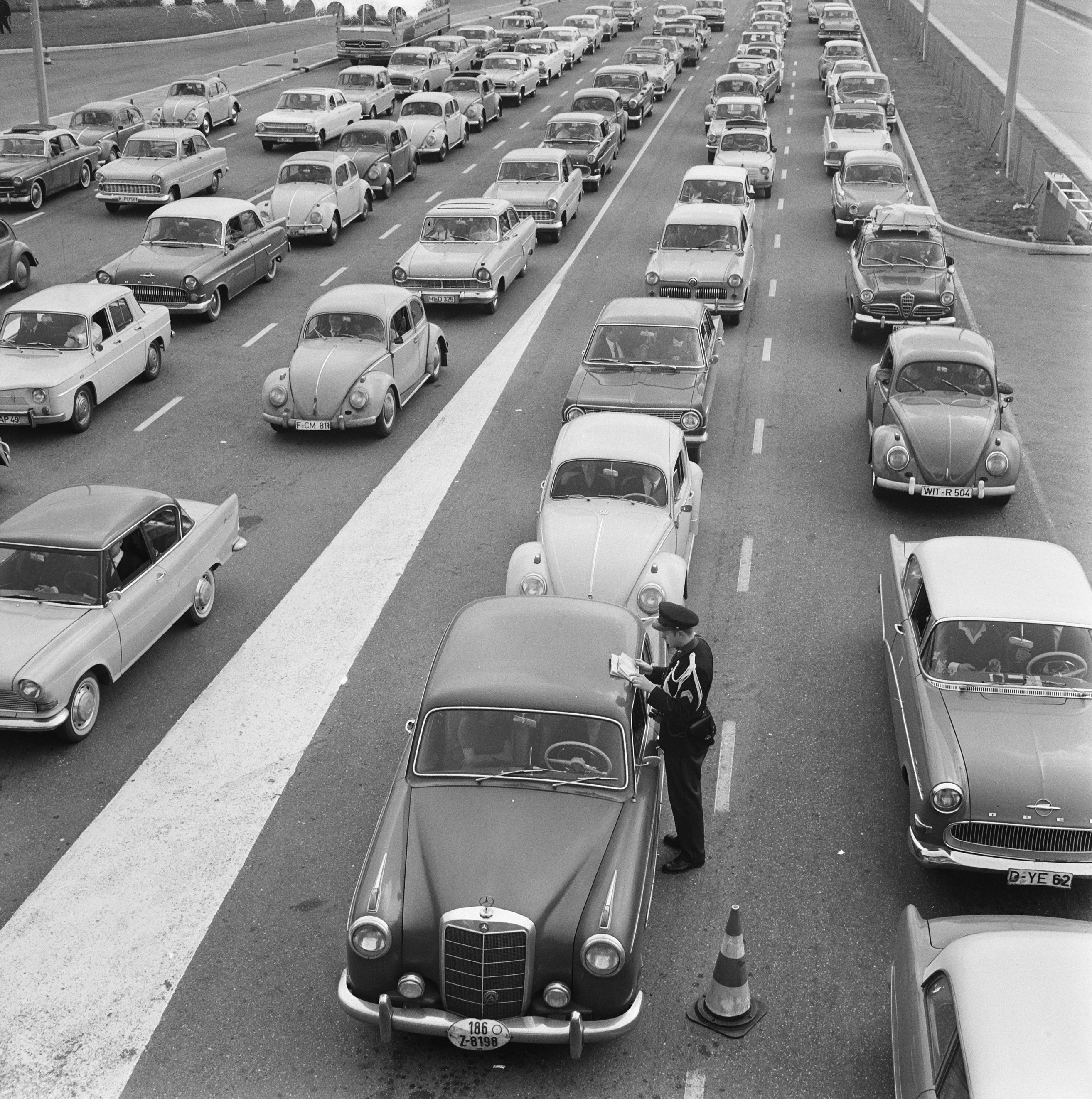 Collectie / Archief : Fotocollectie Anefo Reportage / Serie : [ onbekend ] Beschrijving : Toeristeninvasie bij grensovergang Bergh op Goede Vrijdag Datum : 27 maart 1964 Locatie : Bergh, Gelderland, Montferland Trefwoorden : auto's, invasies, toeristen, verkeer Fotograaf : Koch, Eric / Anefo Auteursrechthebbende : Nationaal Archief Materiaalsoort : Negatief (zwart/wit) Nummer archiefinventaris : bekijk toegang 2.24.01.03 Bestanddeelnummer : 916-2357